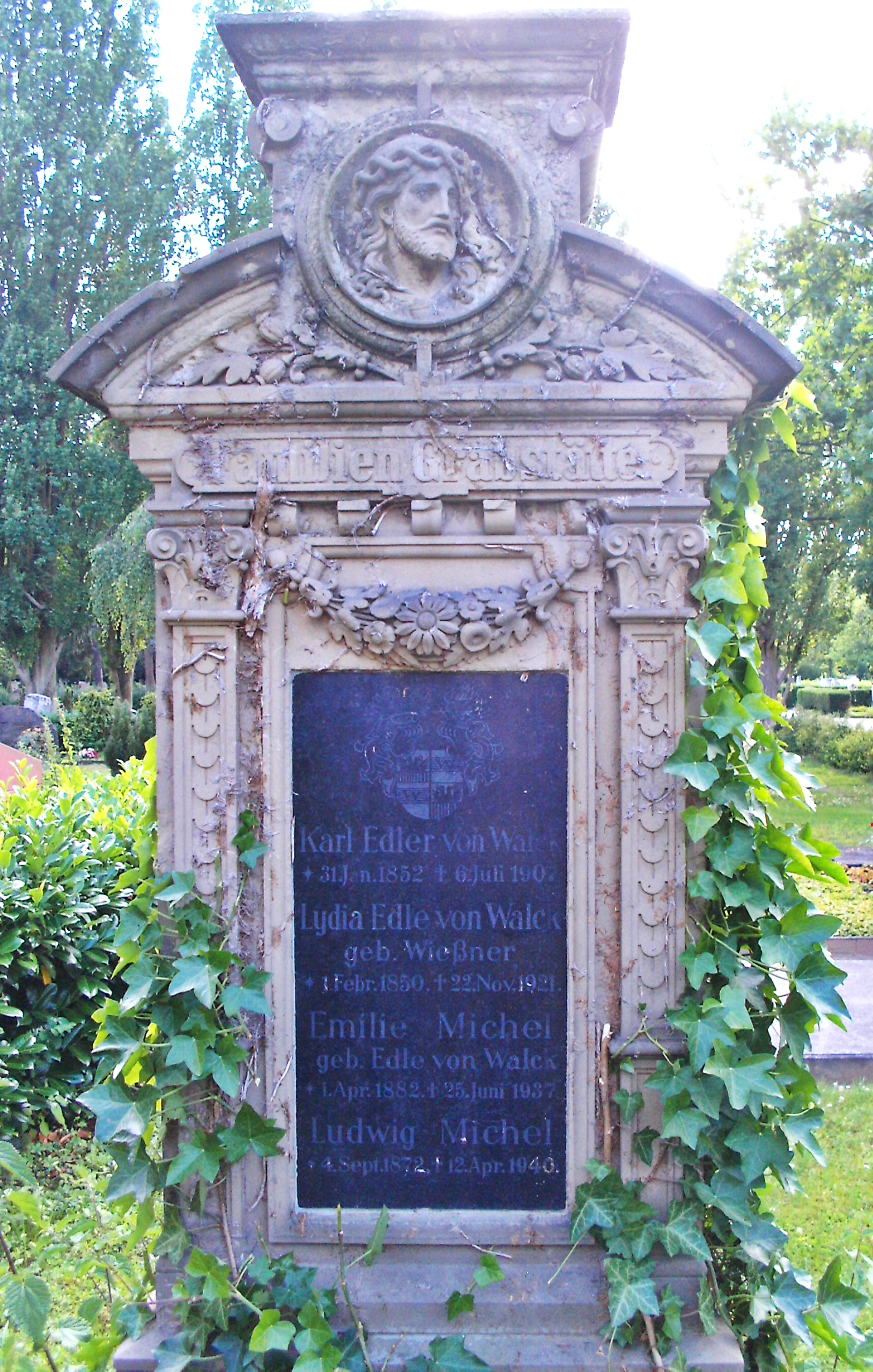 Familiengrabstein der "Edlen von Walck", auf dem Neuen Friedhof Speyer